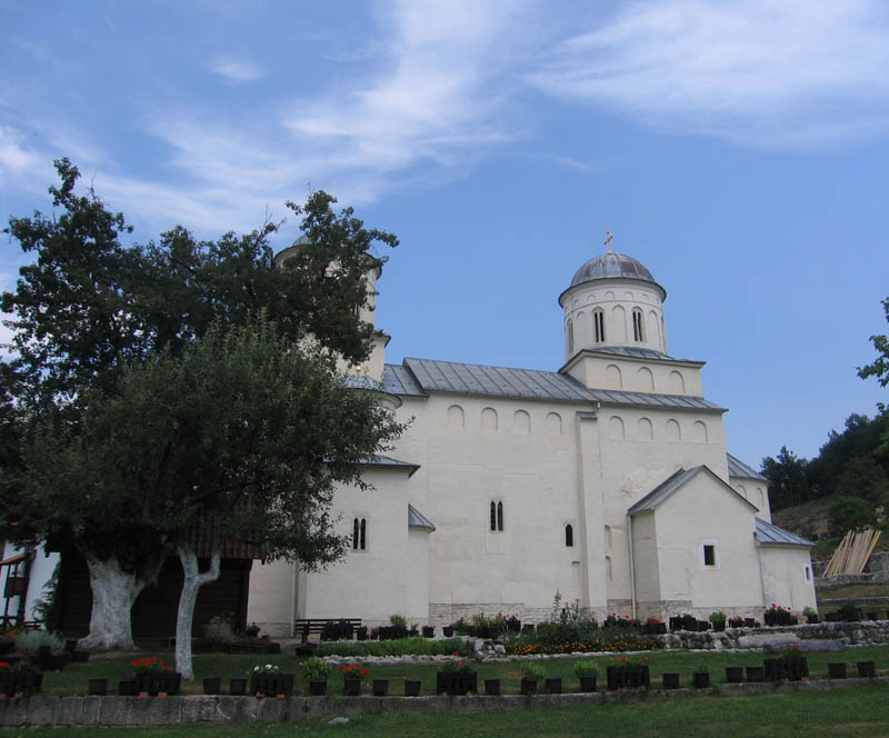 Južna strana crkve u manastiru Mileševa